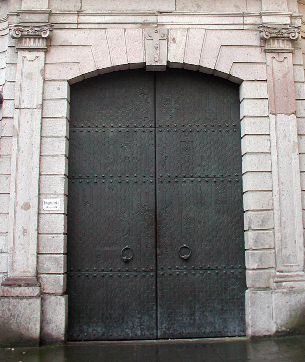 Brühl, Schlosskirche